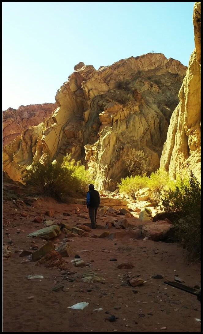 Cañón Arcoiris, un sitio de ensueño que transmite paz y calma que llenan el alma. Un paraíso multicolor con una belleza impresionante, geoformas talladas por la erosión del agua y el viento, vegetación que documentan la evolución del planeta. Un fantástico lugar escondido en el oeste de La Rioja. Parque Nacional Talampaya- Cañon Arcoiris